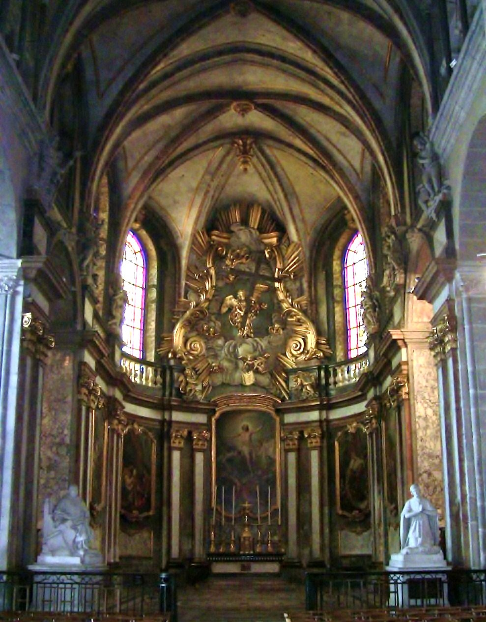 L'abside dit du Saint-Suaire de la cathédrale Saint-Jean de Besançon (Doubs, France).